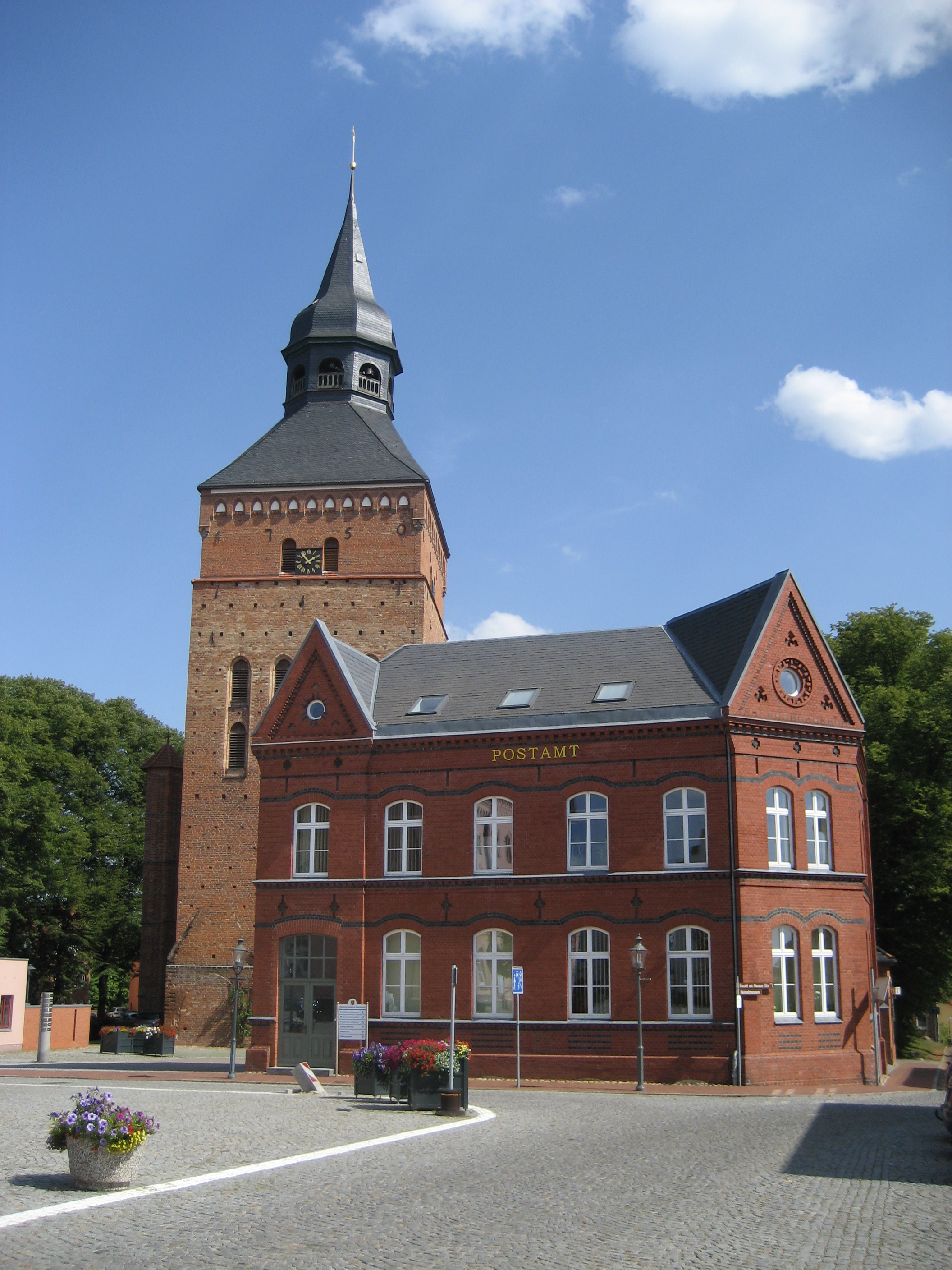 Die Stadtkirche St. Maria und St. Nikolaus (links) und das Alte Postamt (rechts) in Sternberg.